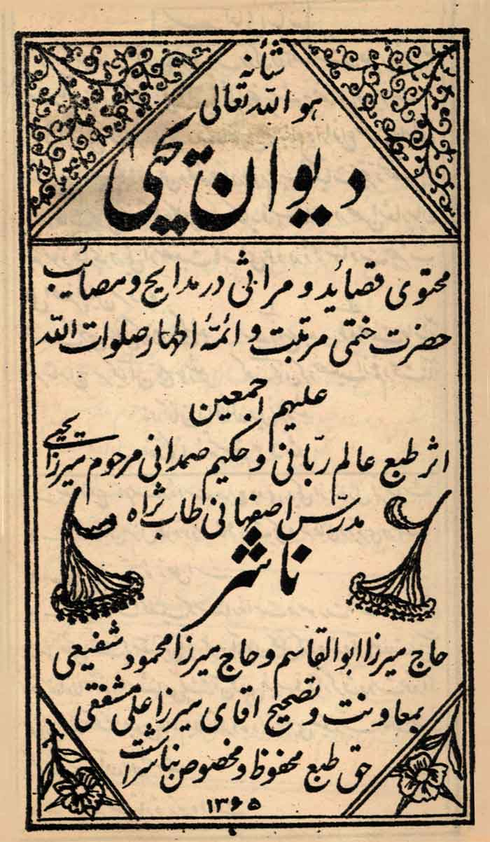 دیوان اشعار آقا ميرزا يحيي مدرس بيدآبادي (1217-1310 ه ش ) متخلص به یحیی و معروف به میرزا یحیی مدرس اصفهانی با حدود شش هزار بیت شامل مدیحه سرایی، ادبیات و اشعار آیینی می باشد